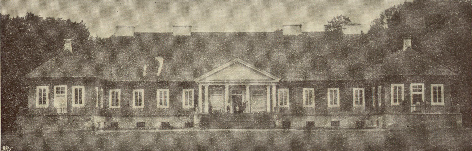 Беларуская (тарашкевіца): Беніца (Bienica), сядзіба Коцелаў (Kocieł)